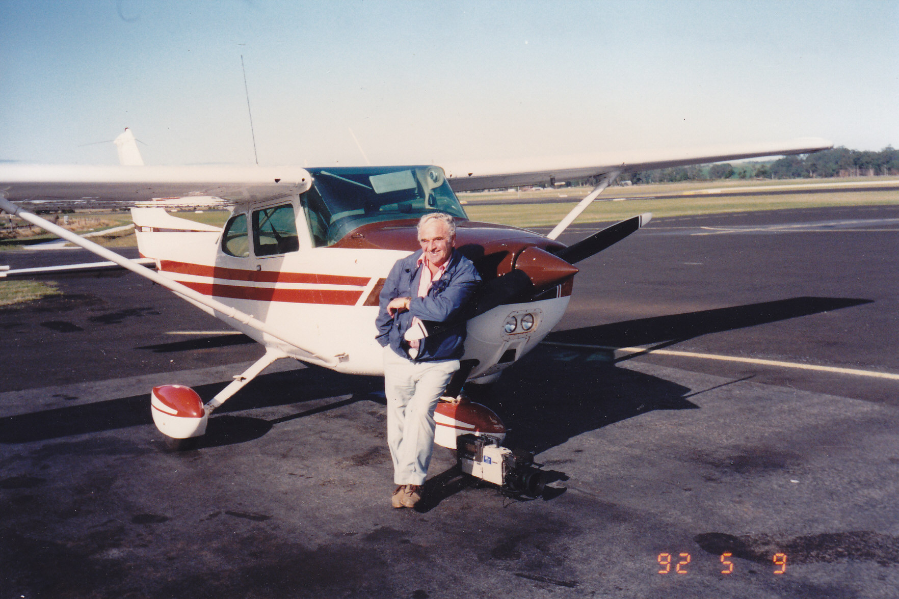 Milan Vyhnálek měl rád létání